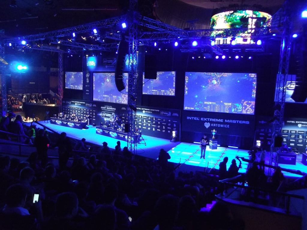 Zdjęcie zrobione podczas Intel Extreme Masters 2013 w katowickim Spodku.